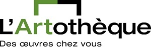 Logo de L'Artothèque